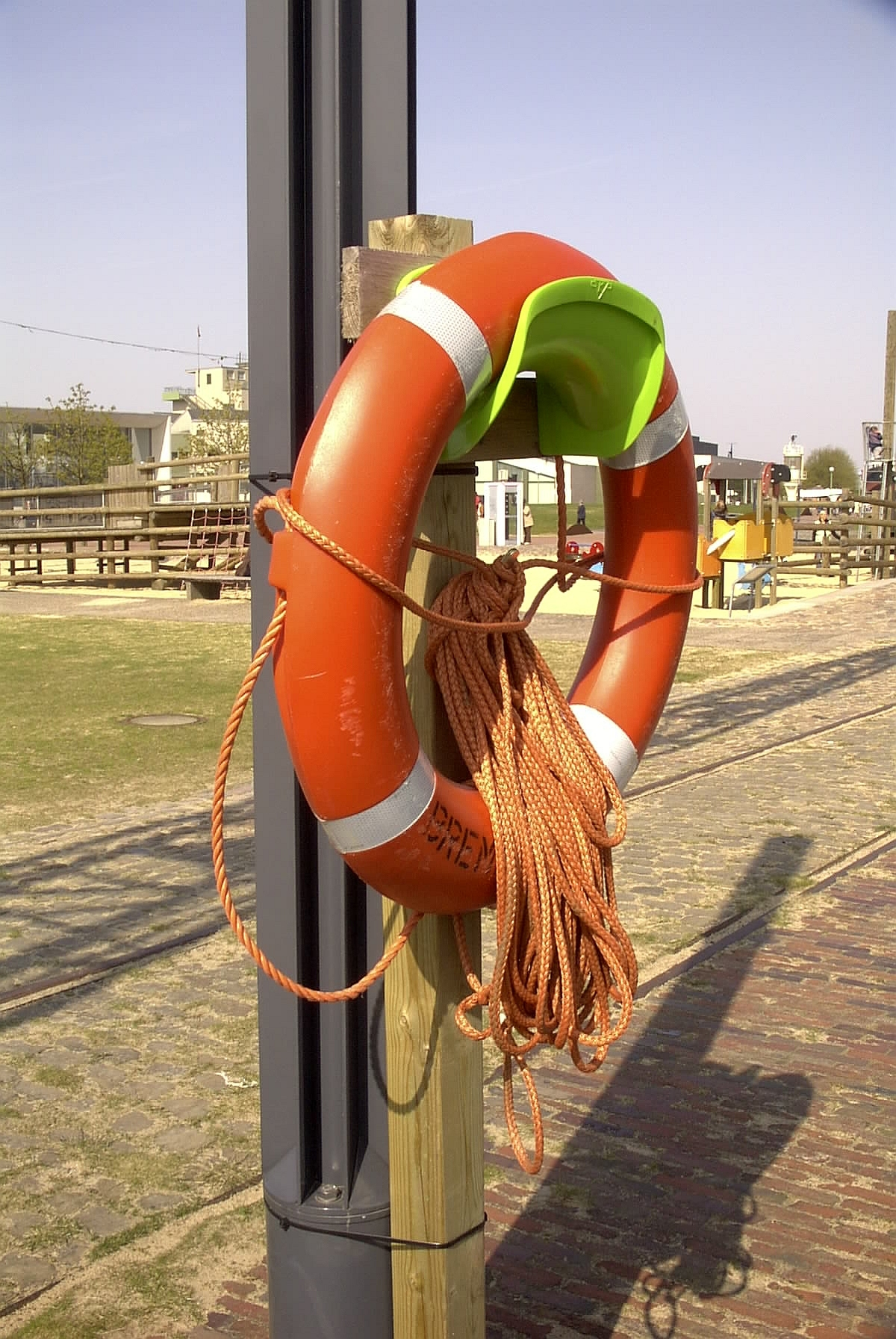 Rettungsring